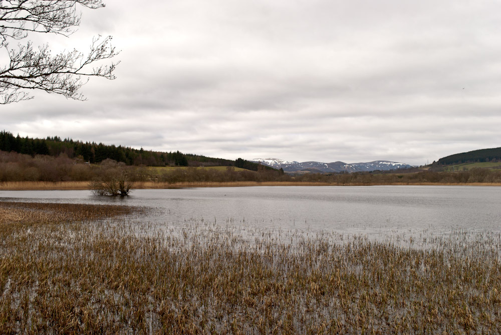 Loch Achnacloich